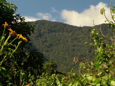 Porción más elevada de la Fila Cola de Caballo al norte de la ciudad de Maracay, Venezuela